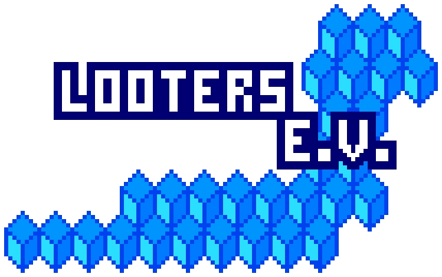 Logo des Looters-Ensembles